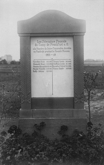 Frankfurt an der Oder, Kriegsgefangenenlager, Les Prisonniers Francais, Gedenkstein